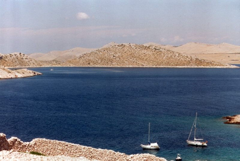 Levrnaka, Kornati, Croatia